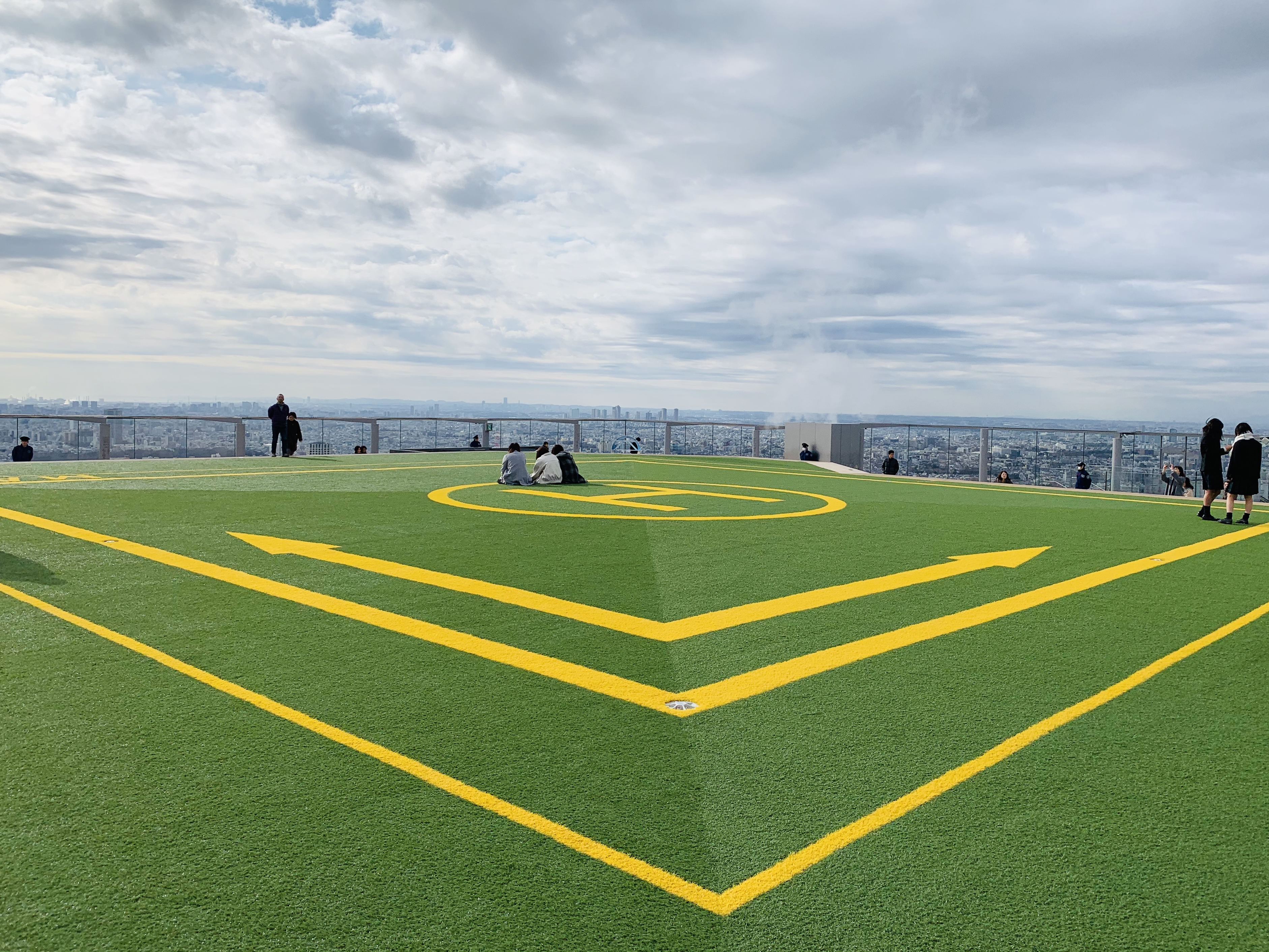 ヘリポート - SKY STAGE